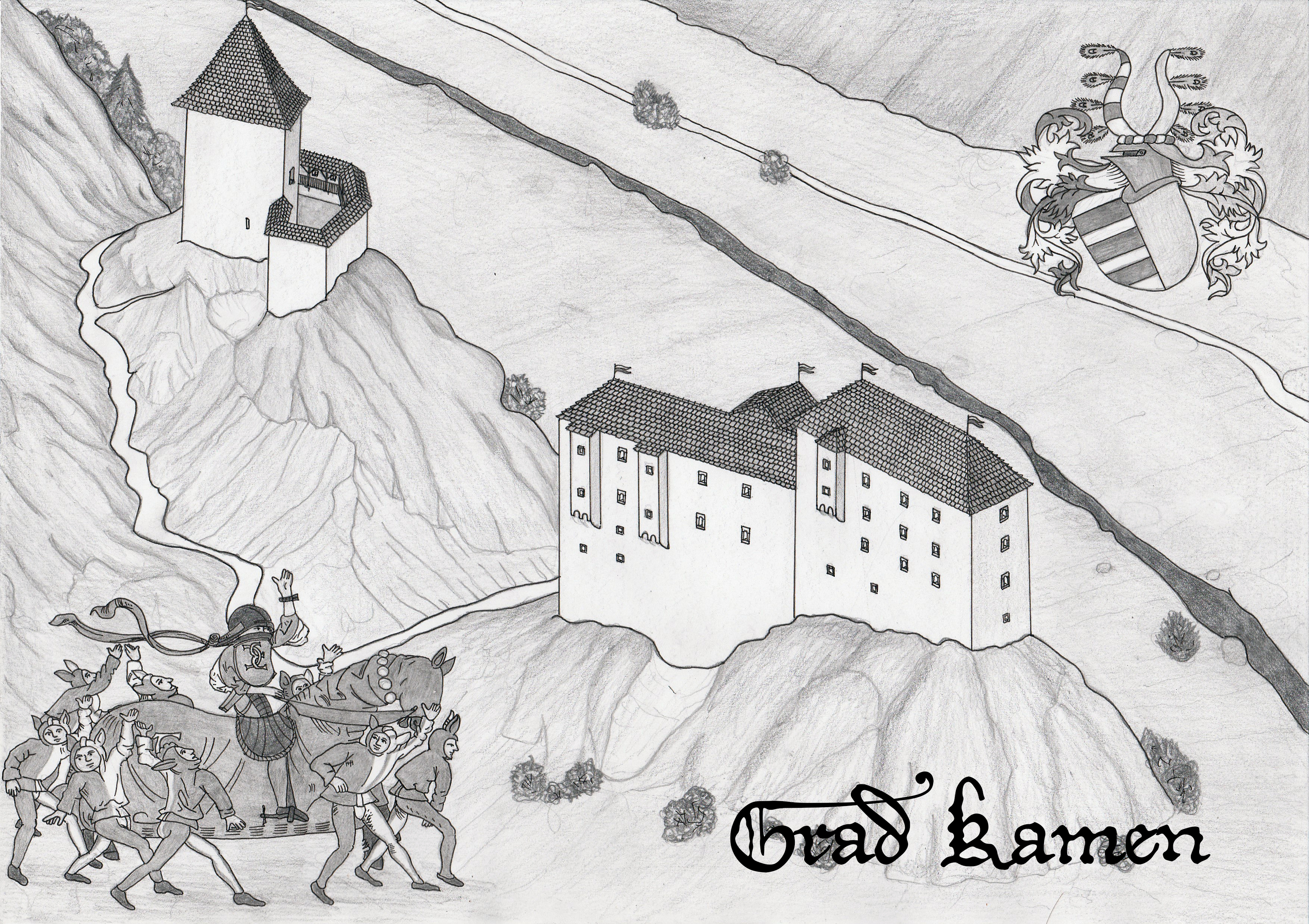 Poskus rekonstrukcije gradu Kamen v 15.stol. Delano po skicni osnovi slovenskega arhitekta, konservatorja, profesorja in publicista, Petra Fistra. Zgoraj desno je grb plemiške družine Lamberg. Spodaj desno je upodobitev viteza (Gašperja) je delana na podlagi turnirske knjige Gašperja Lambergerja iz leta 1544.